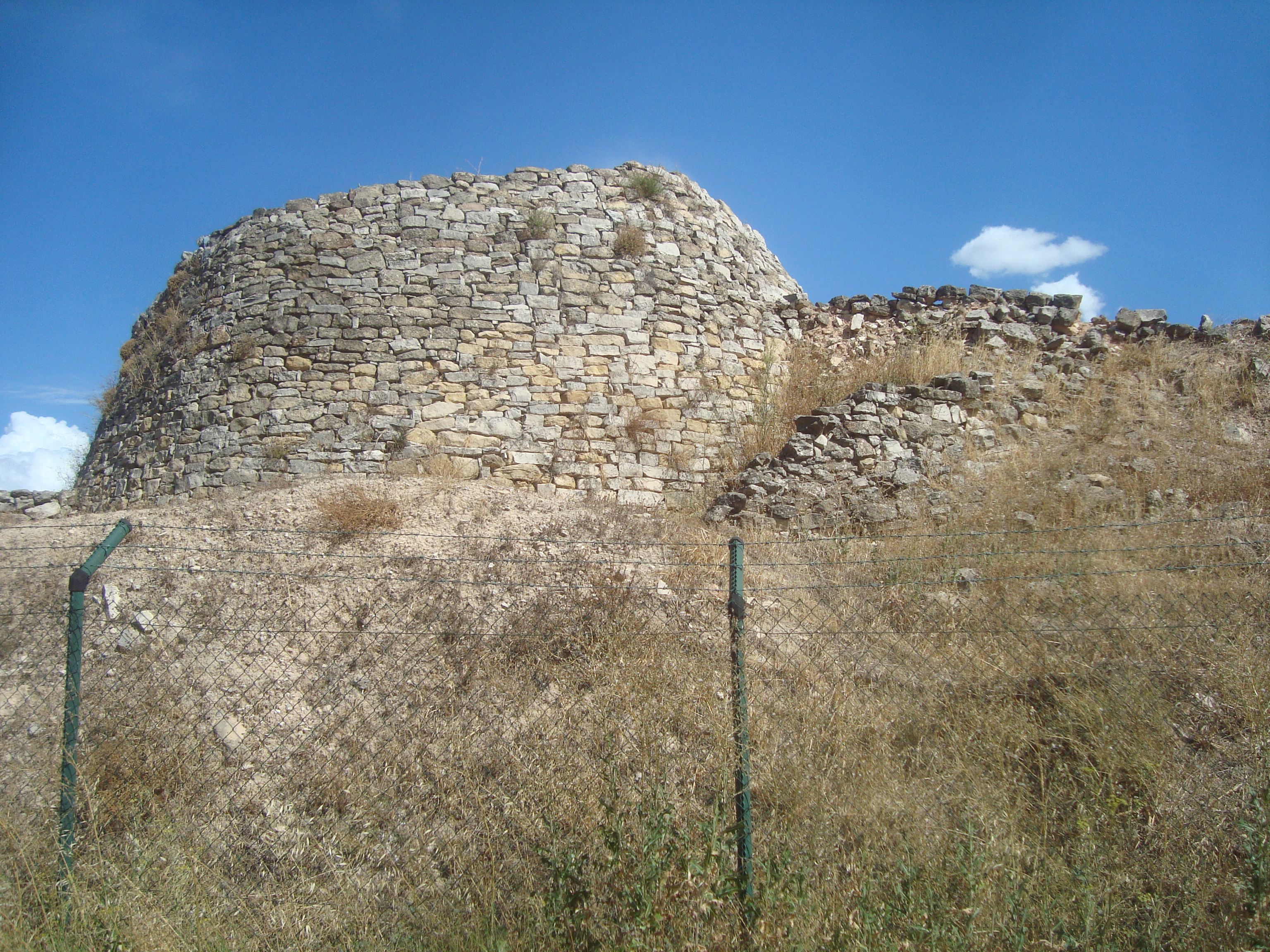 Poblat ibèric del Coll del Moro (Gandesa)